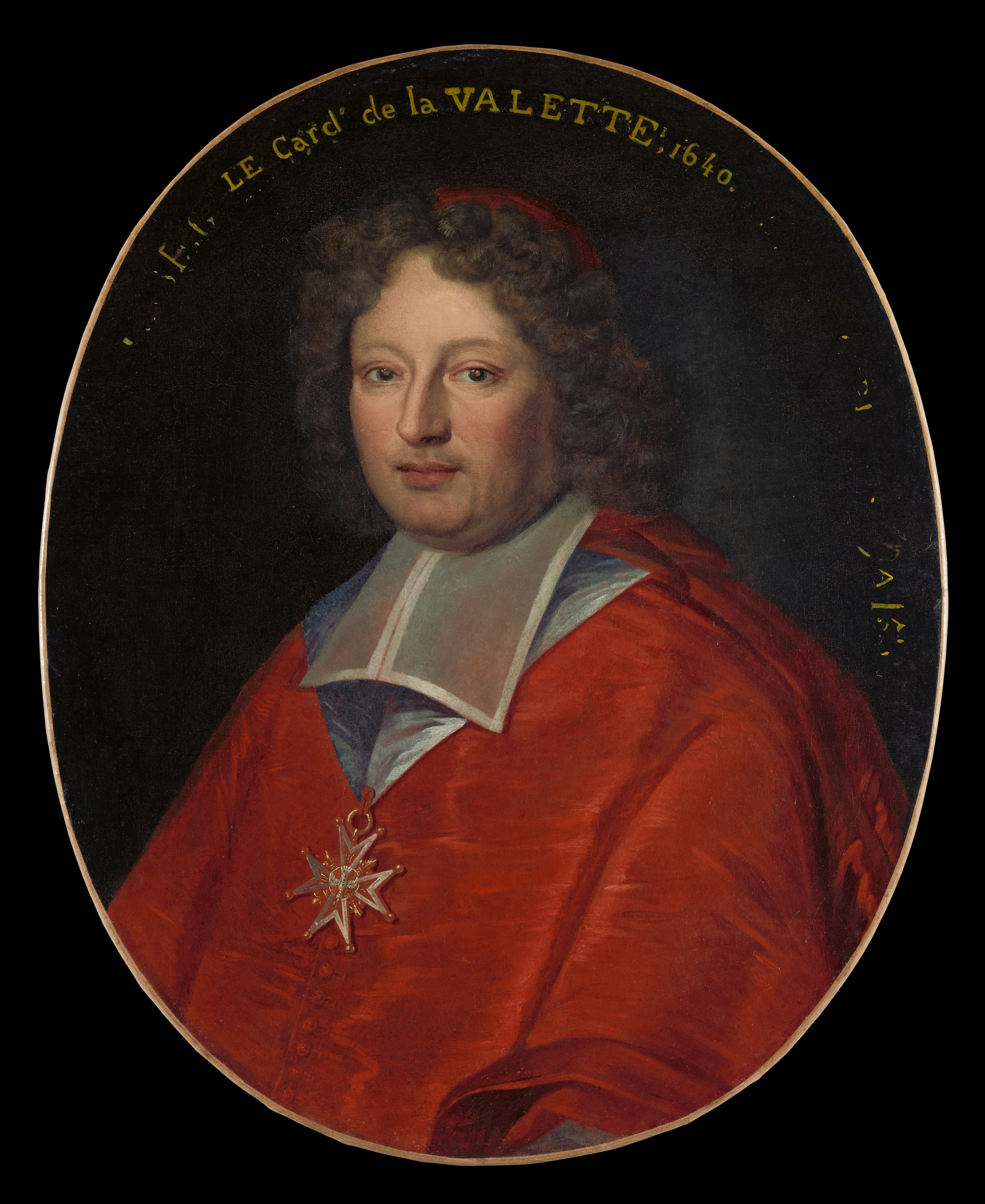 Précédemment identifié comme portrait de Louis de Nogaret d'Épernon, cardinal de La Valette.